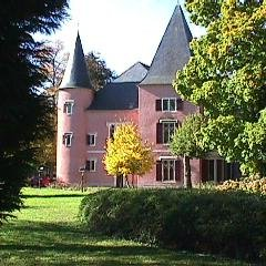 Schlass Ierpeldeng, Sëtz vun der Gemeng Ierpeldeng. Privatfoto. Kategorie:Gemeng Ierpeldeng Ierpeldeng